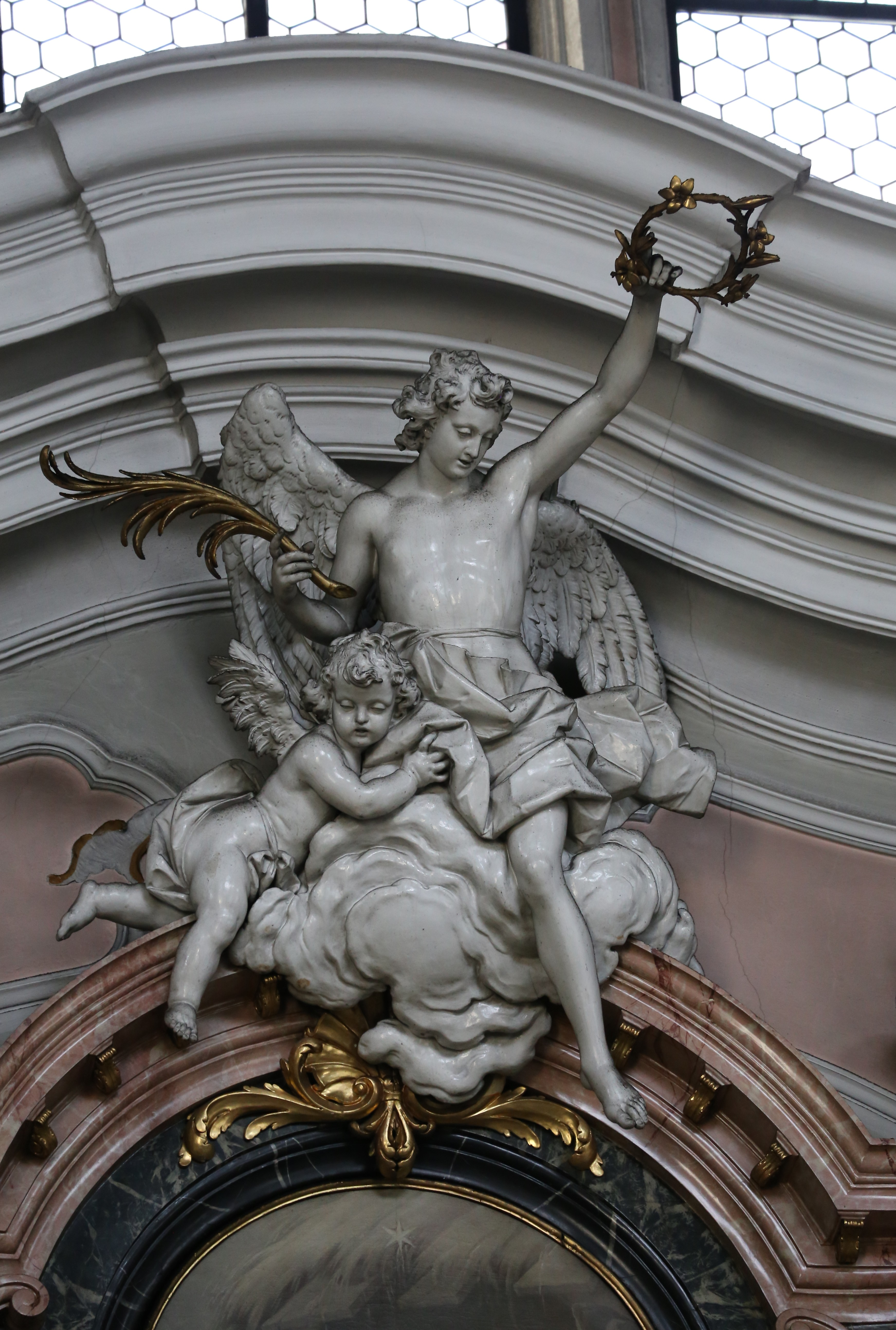 Pfarrkirche St. Johannes der Täufer, Toblach Barockes Langhaus von Baumeister Rudolf Schraffl, 1769 errichtet. Freistehender Turm mit Oktogon und Zwiebelhaube um 1800. Wandpfeilerbau mit leicht abgeecktem quadratischem Chor. Flachkuppeln, Fresken-ausstattung von Franz Anton Zeiller (1769).